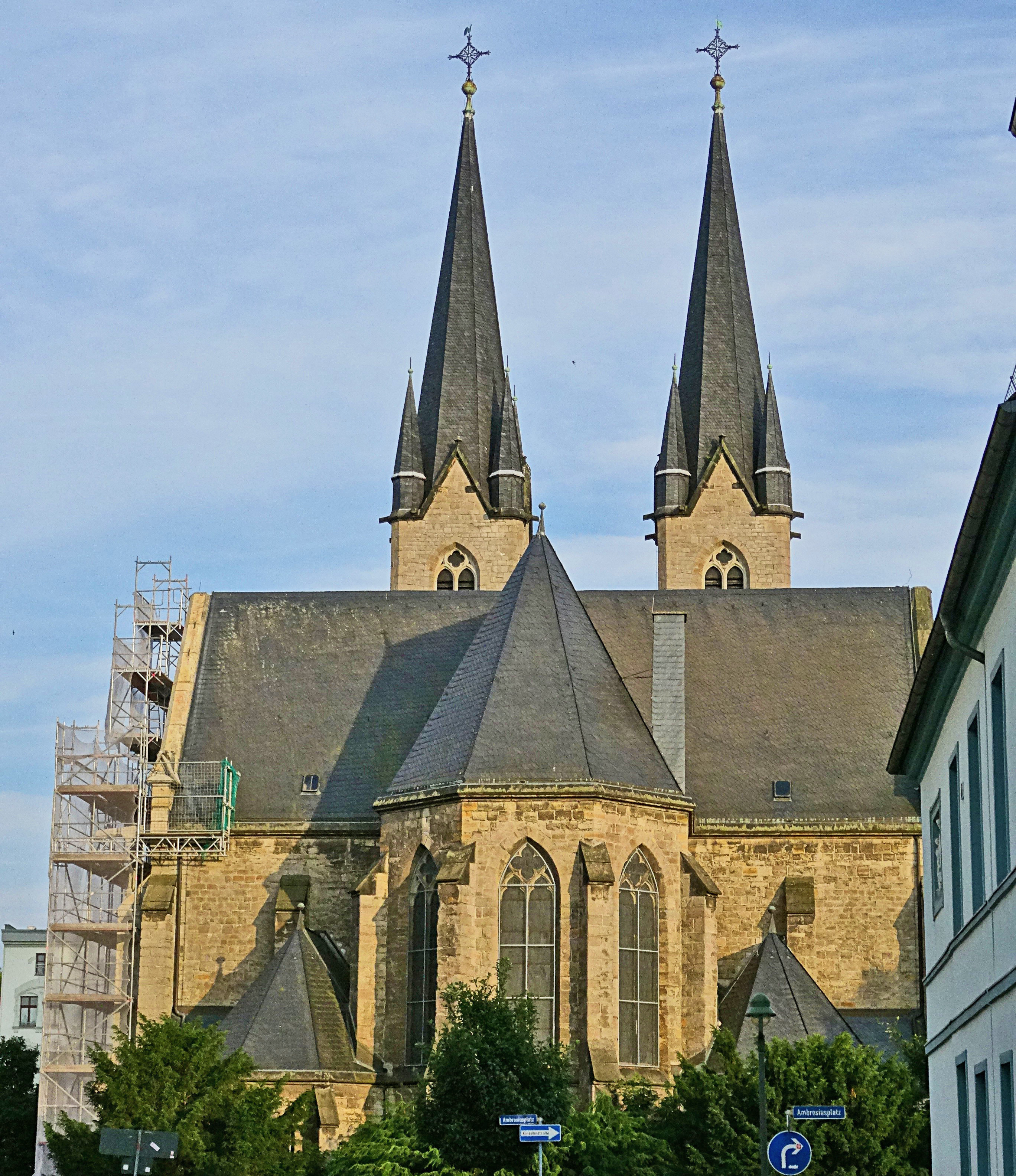 Die Ambrosiuskirche in Magdeburg-Sudenburg